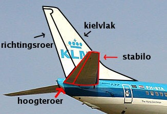 Vliegtuig van File:KLM-vliegtuig.jpg